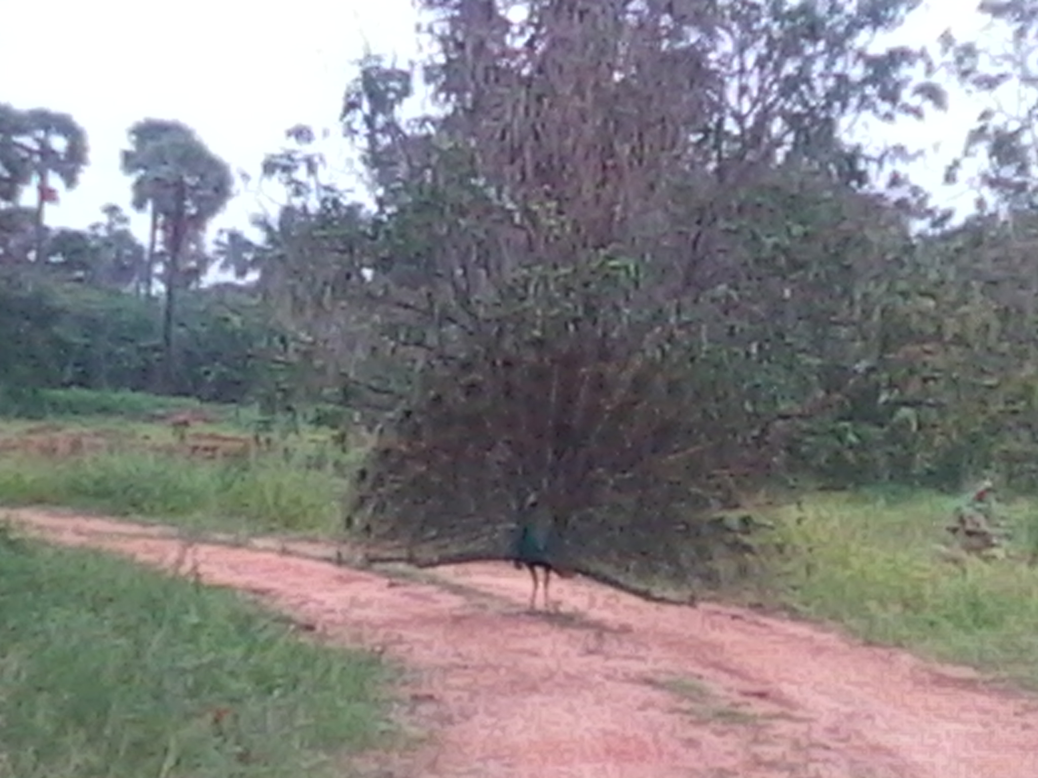 മയിൽ നടനം - തെങ്കാശിയിൽ